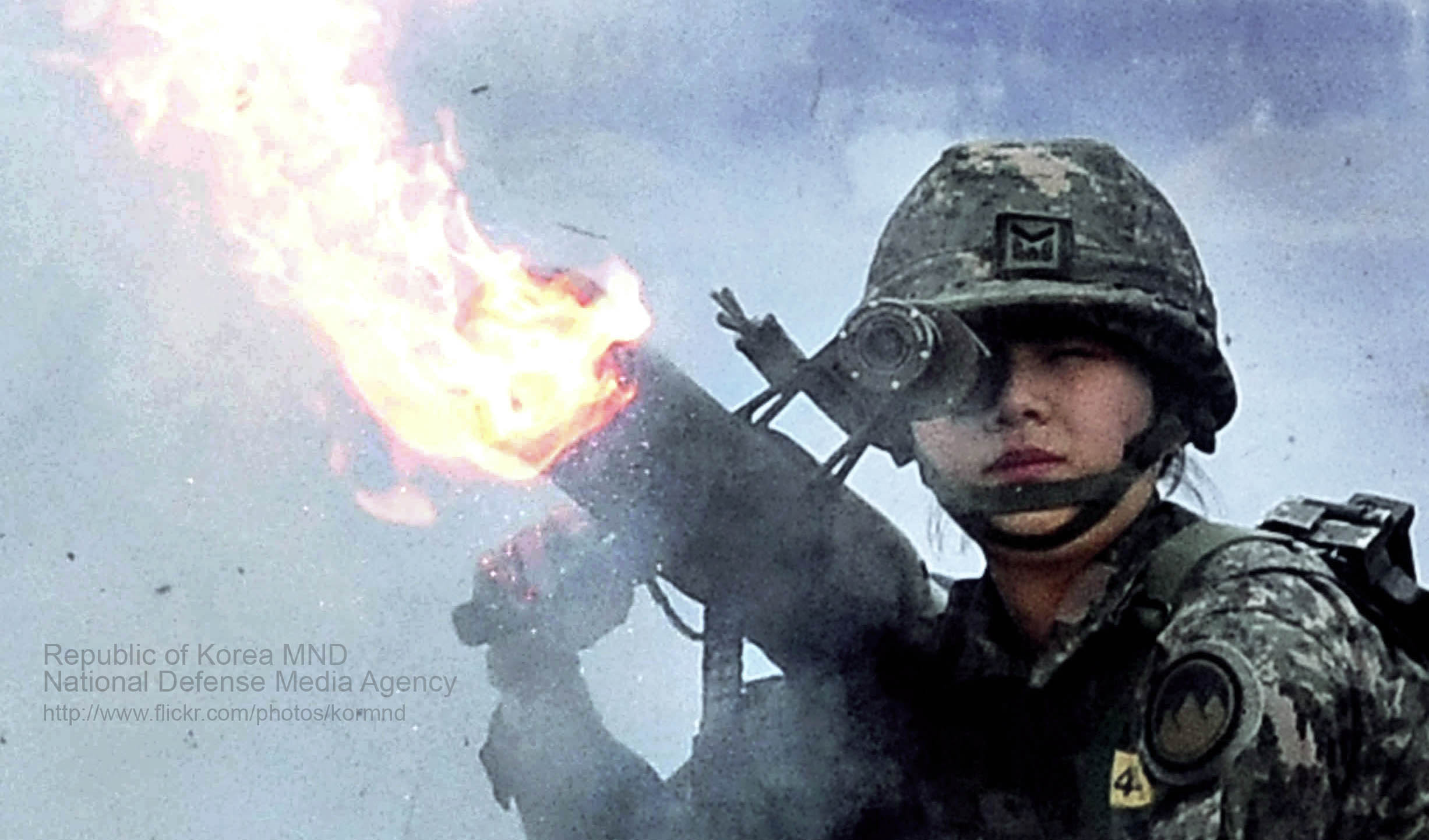 보병병과 하사로 임관한 초급반 여군 교육생이 13일 육군부사관학교 대전차 공용화기 사격장에서 공용화기 고폭탄 실사격 훈련을 하고 있다. 촬영 - 박흥배 기자